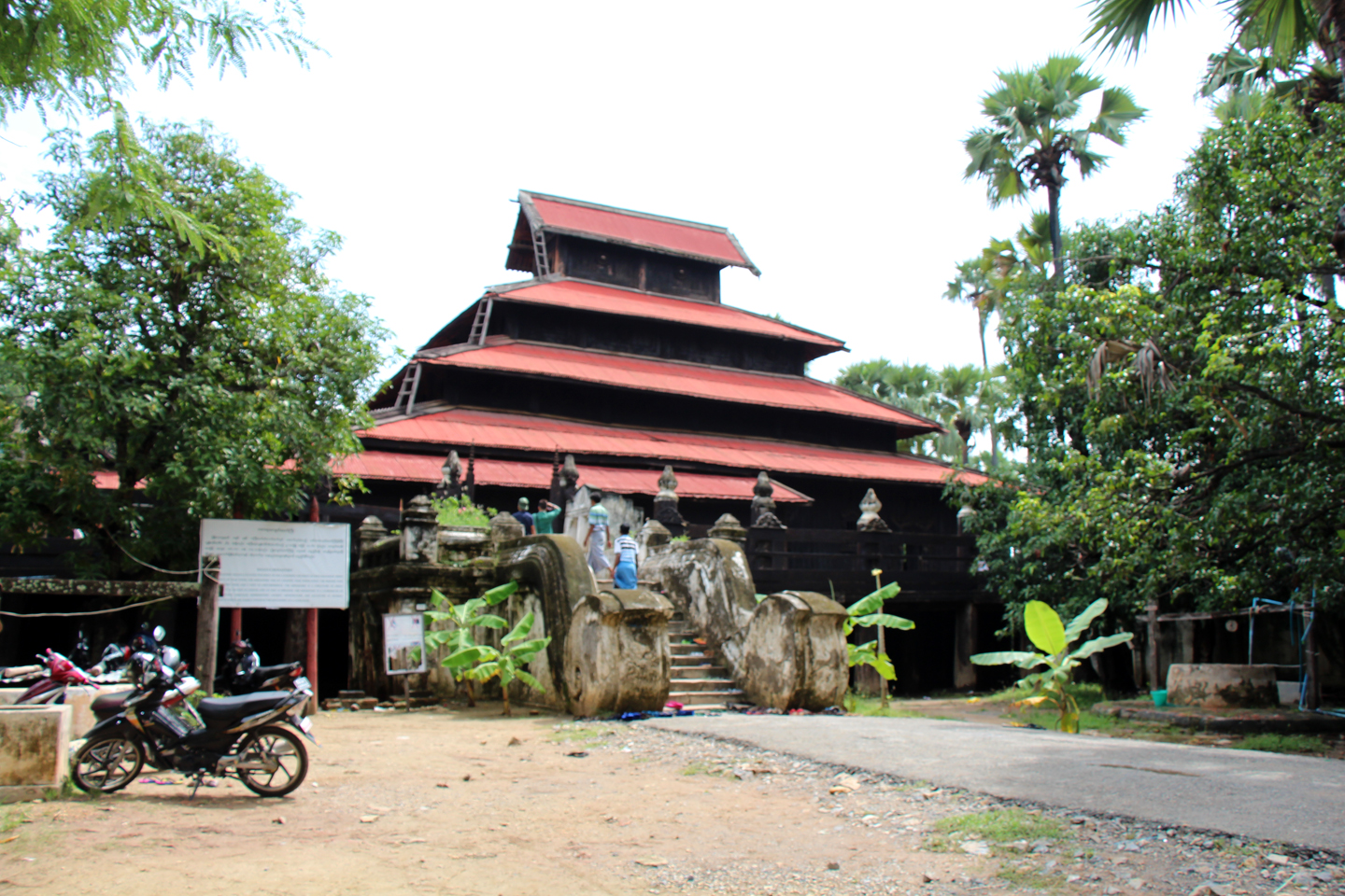 မြန်မာဘာသာ: ဗားကရာ ဘုန်းကြီးကျောင်း (အင်းဝ)